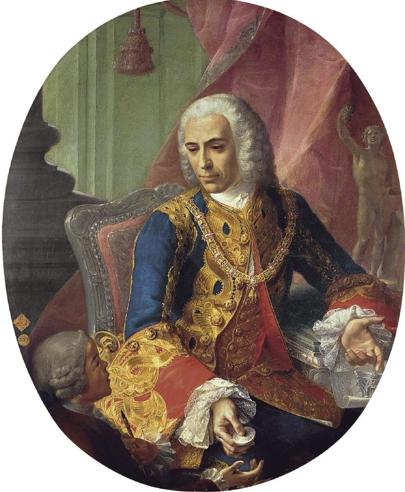 Retrato del aristócrata y politico español José de Carvajal y Lancaster (1698-1754), que llegó a ocupar altos cargos en el siglo XVIII y fue nombrado caballero de la Orden del Toisón de Oro.